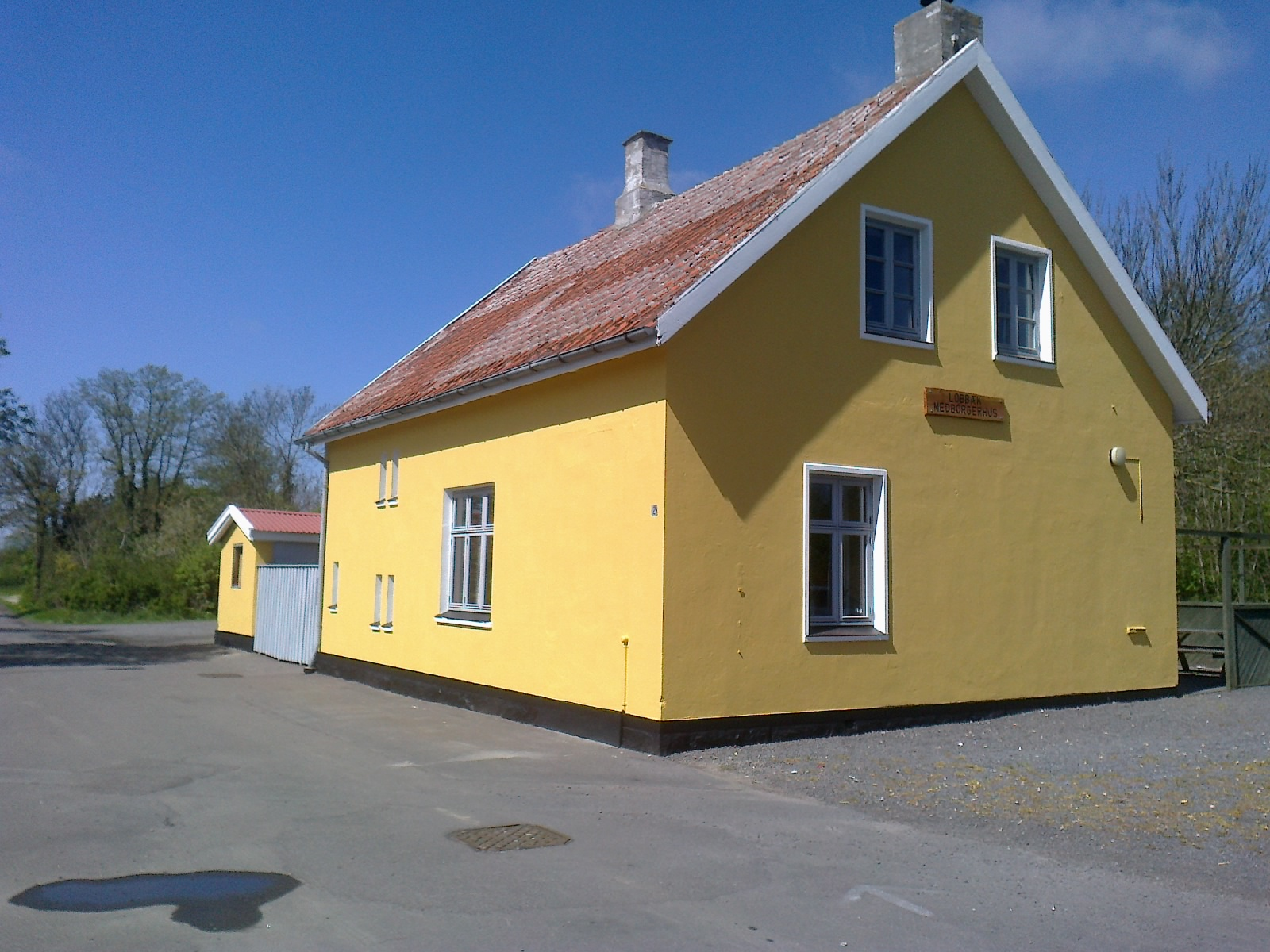 Lobbæk Station, vejside